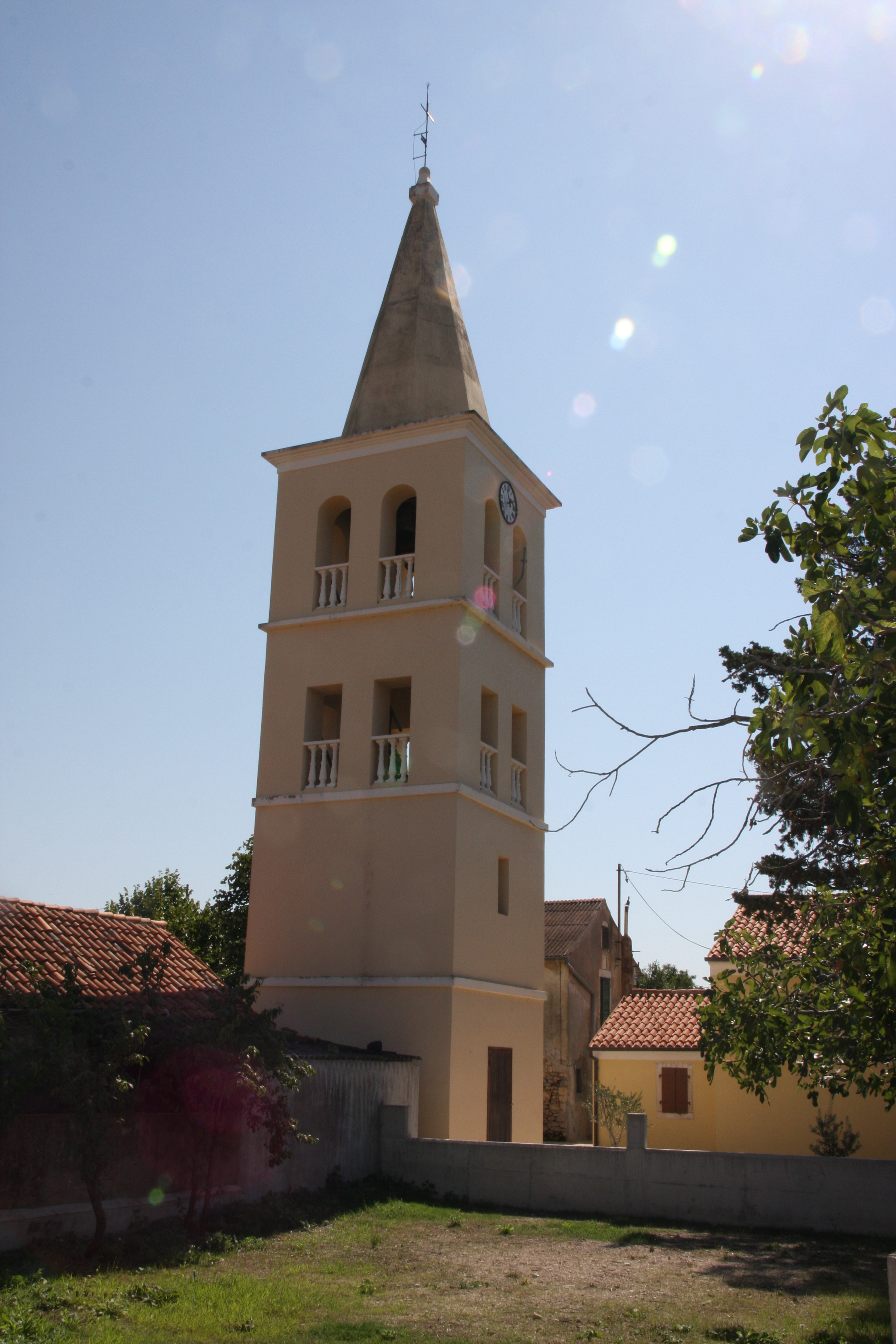 Eglise Saint-Michel de Kozino dans le comitat de Zadar en Croatie